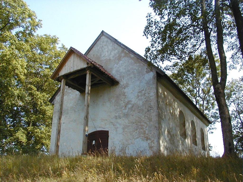 Ilmājas luterāņu baznīca 2002-08-25